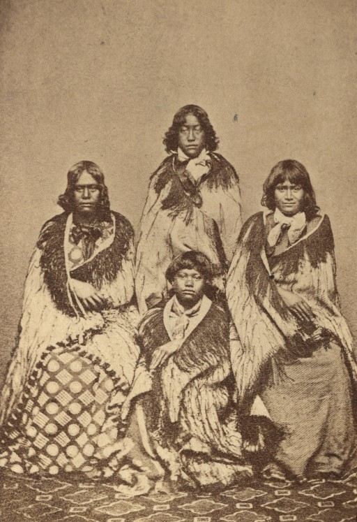 Femmes Maori. Four Maori women.